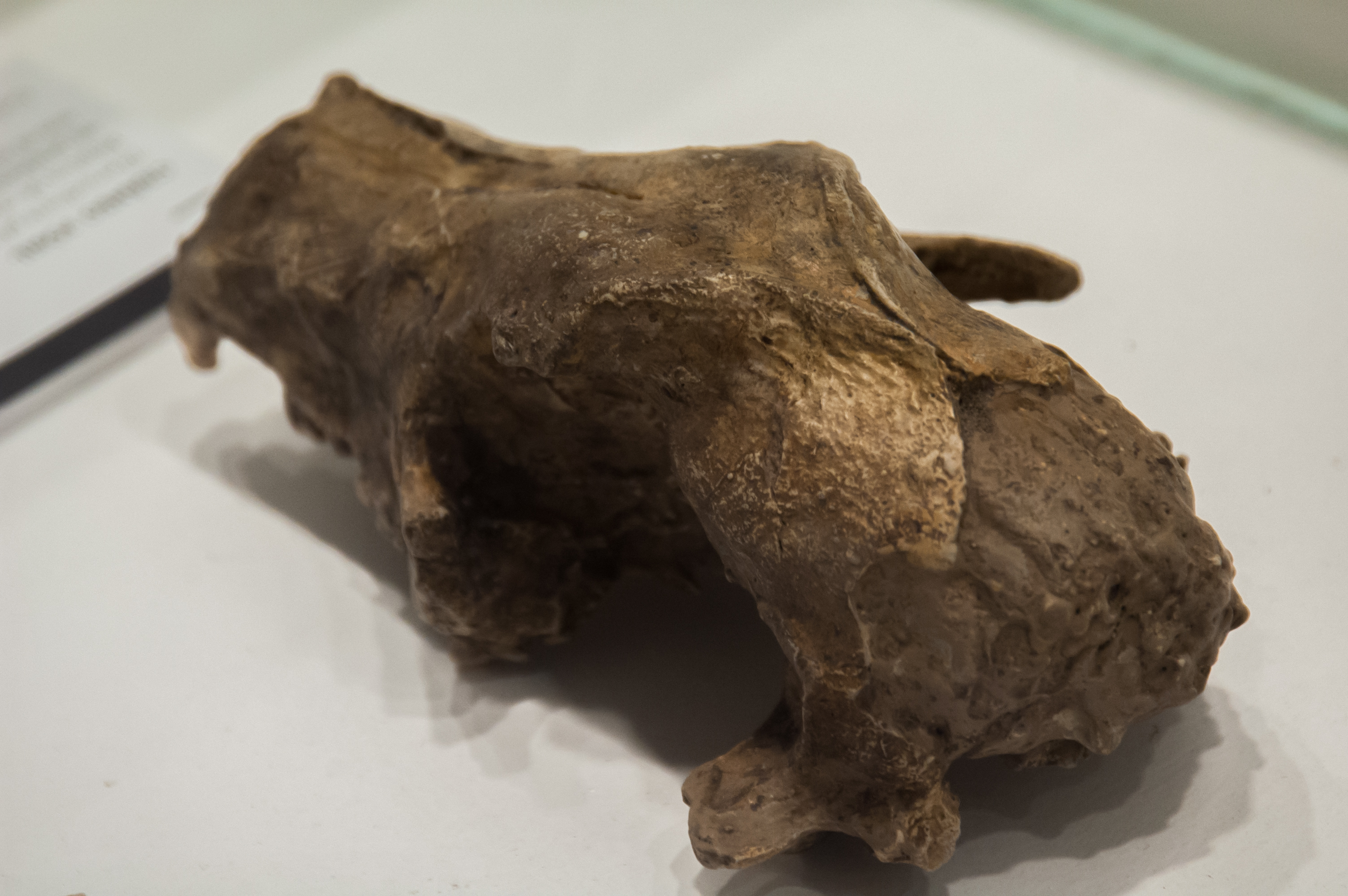 museo malvinas 034 Dusicyon australis